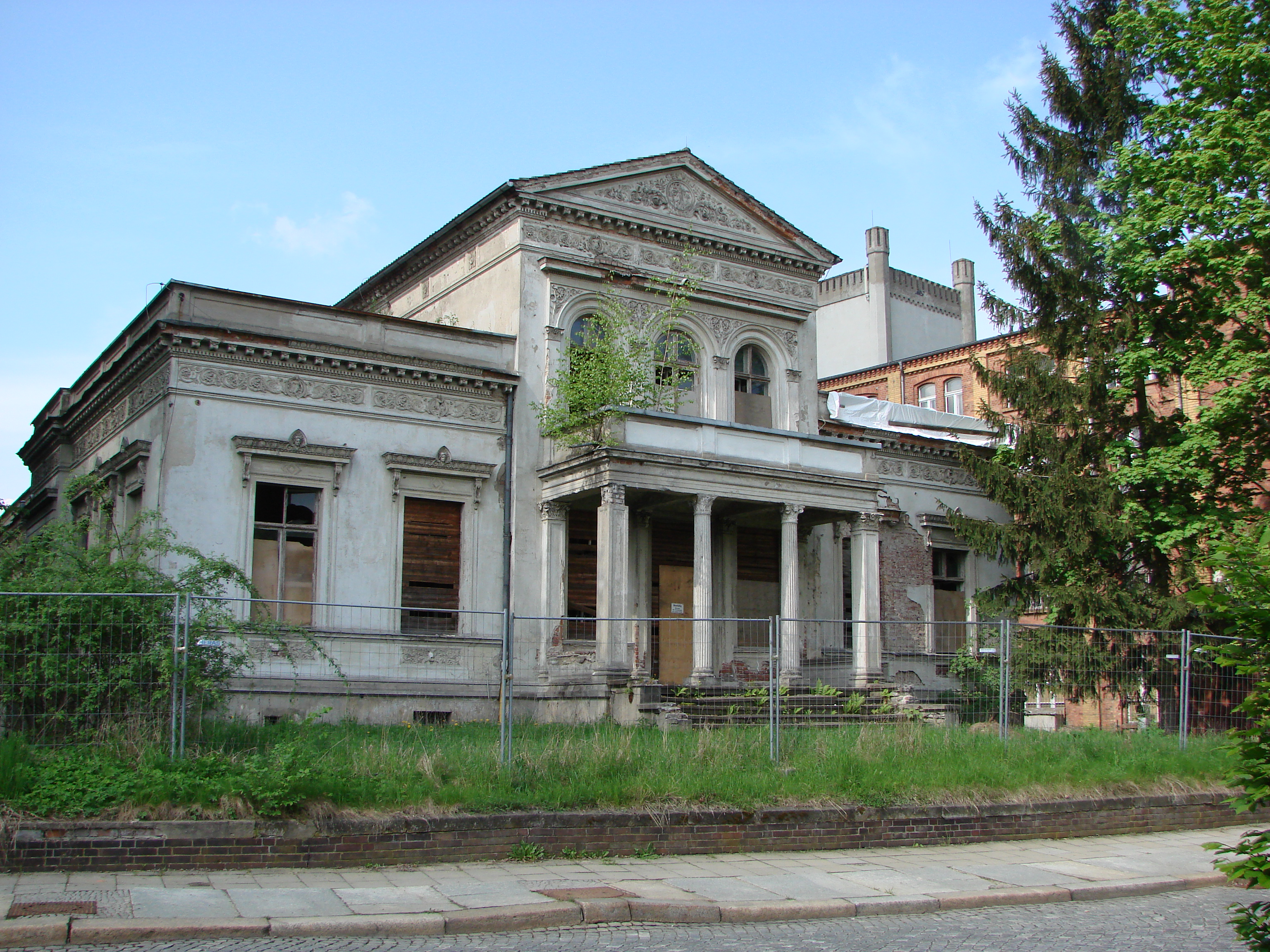 Baudenkmal, Villa